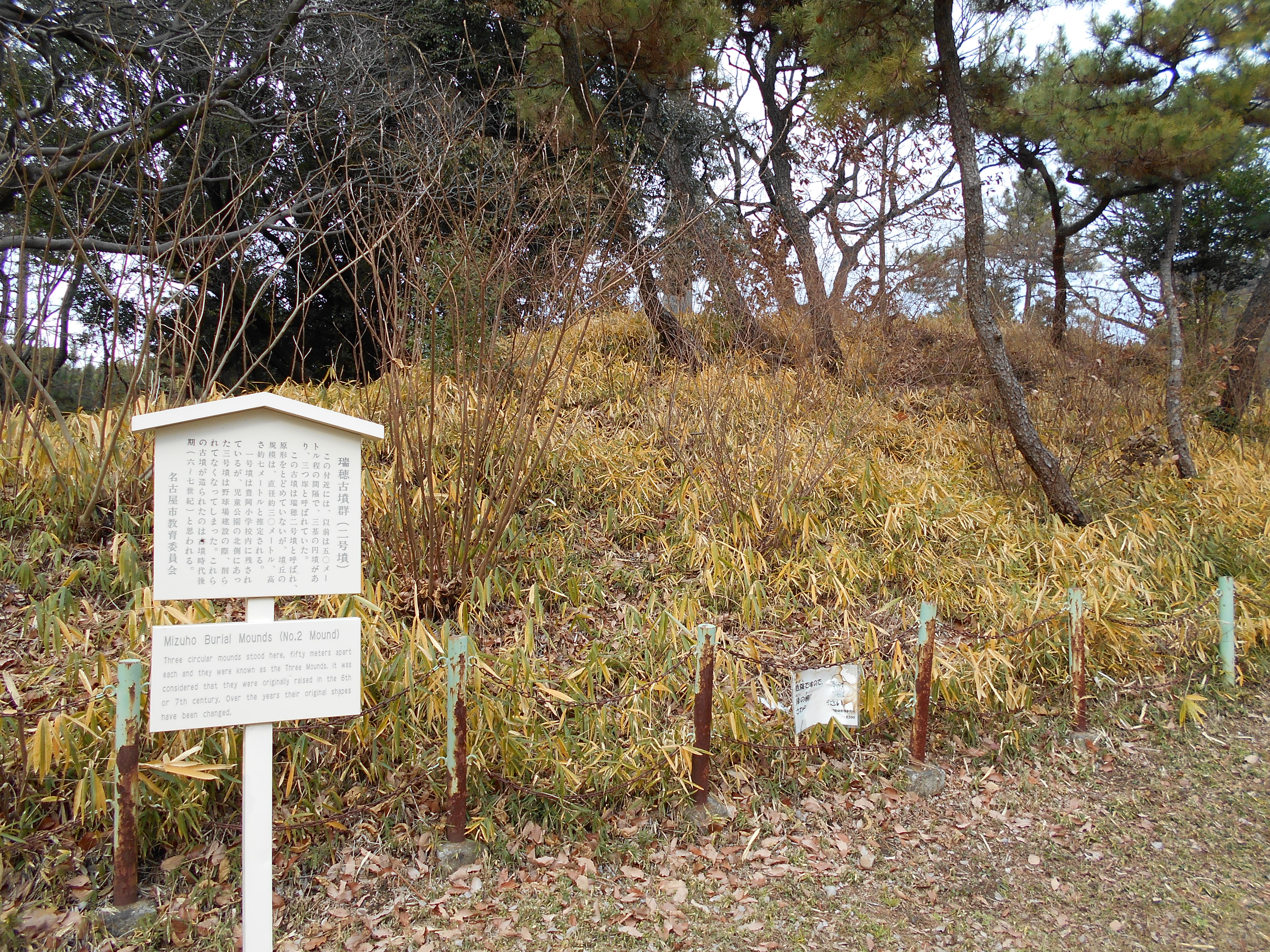 瑞穂古墳群・2号墳（2016年1月）